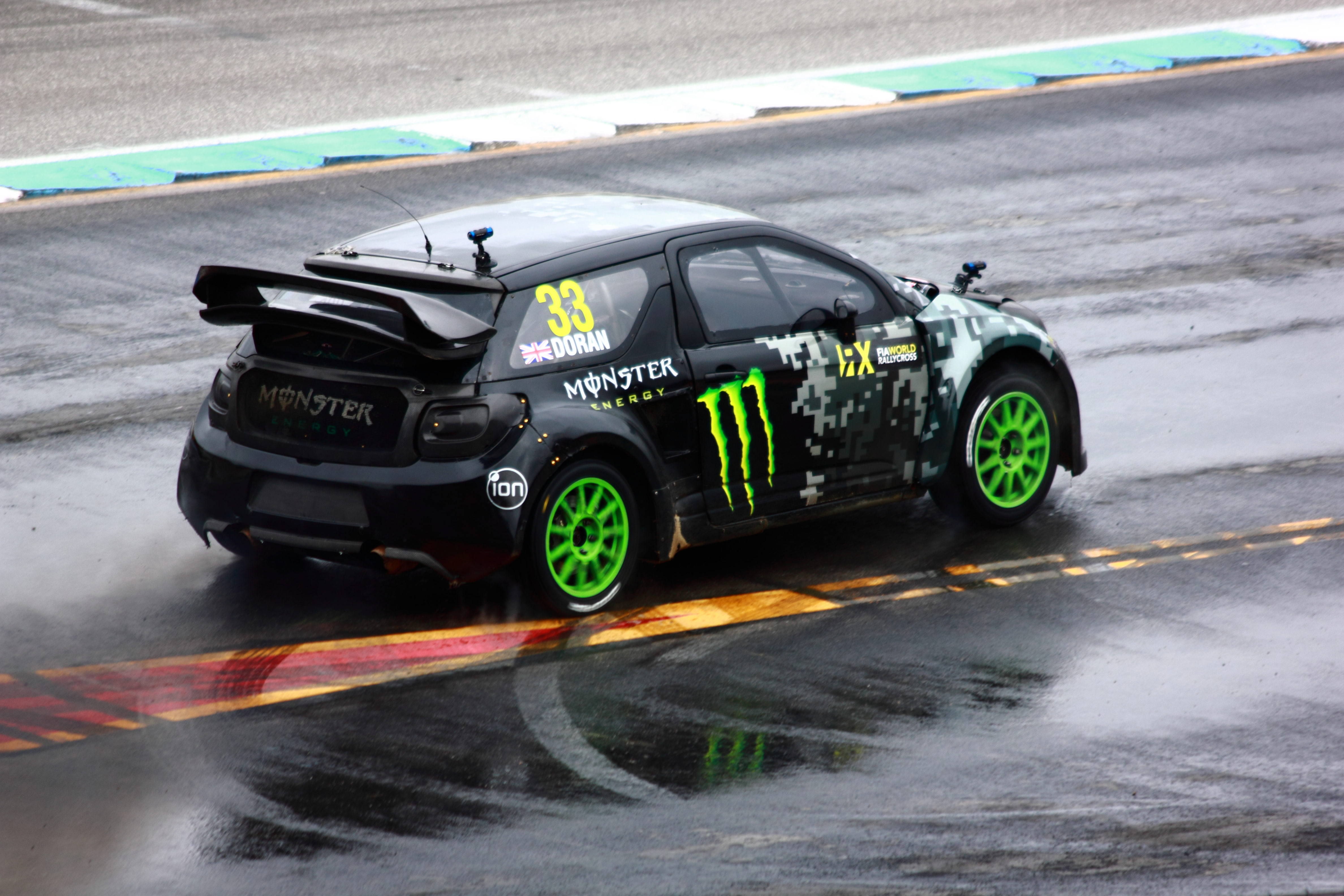 Liam Doran, Citroen DS3, Team SDRX